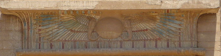 soleil ailé égyptien